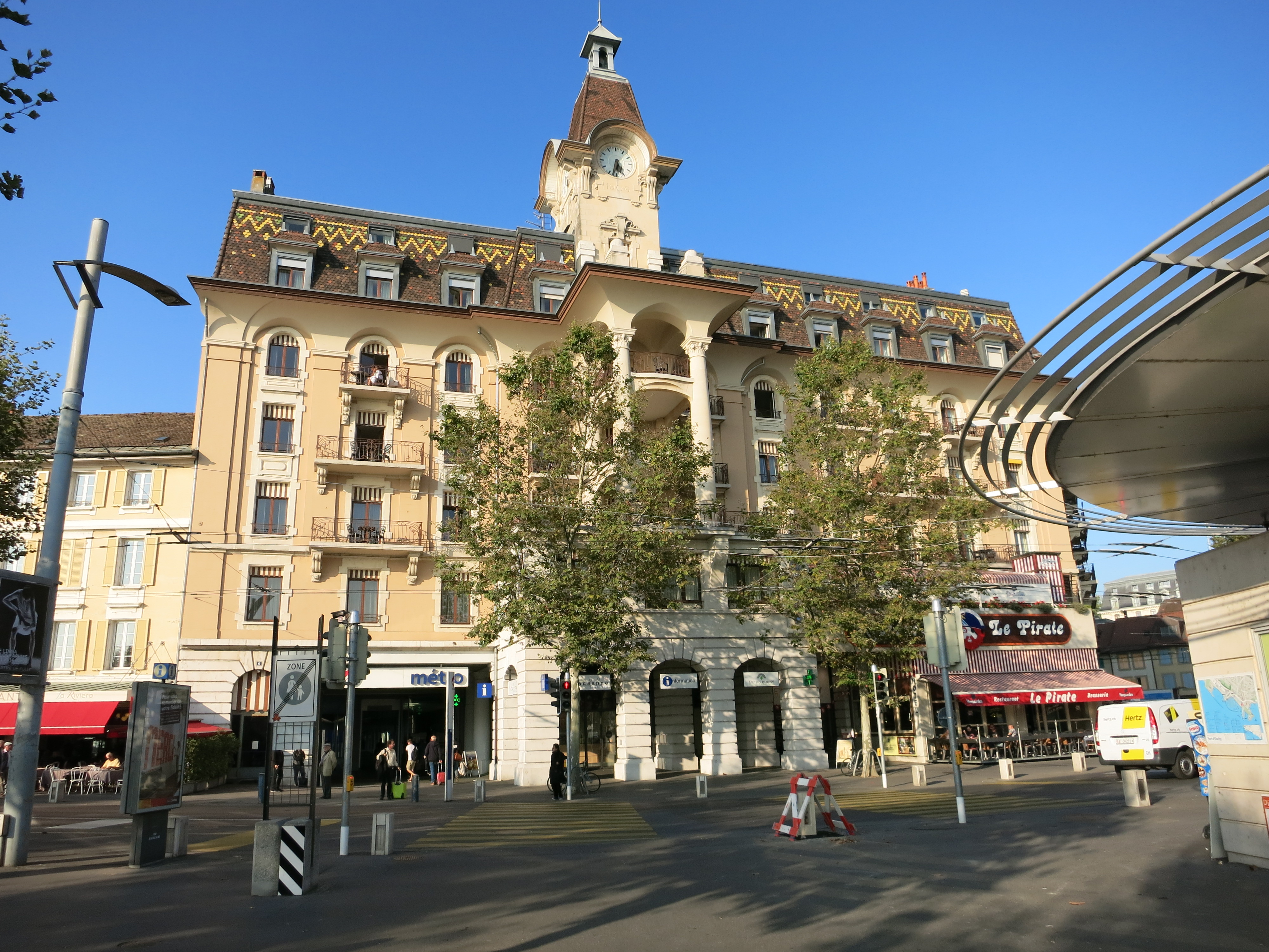 Compagnie Lausanne-Ouchy, Lausanne VD, Schweiz